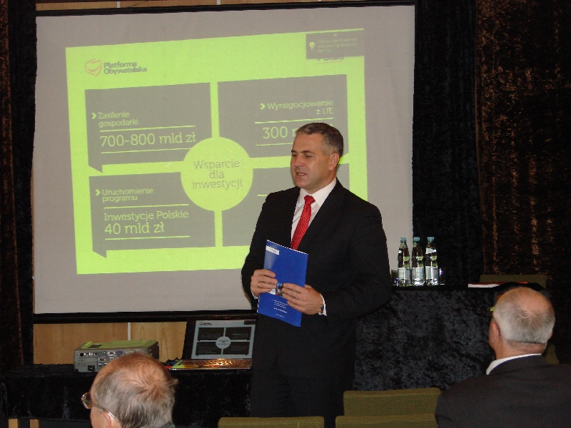 Spotkanie zorganizowane przez Piotra Tomańskiego - Lesko, Podkarpackie (2012-11-27)